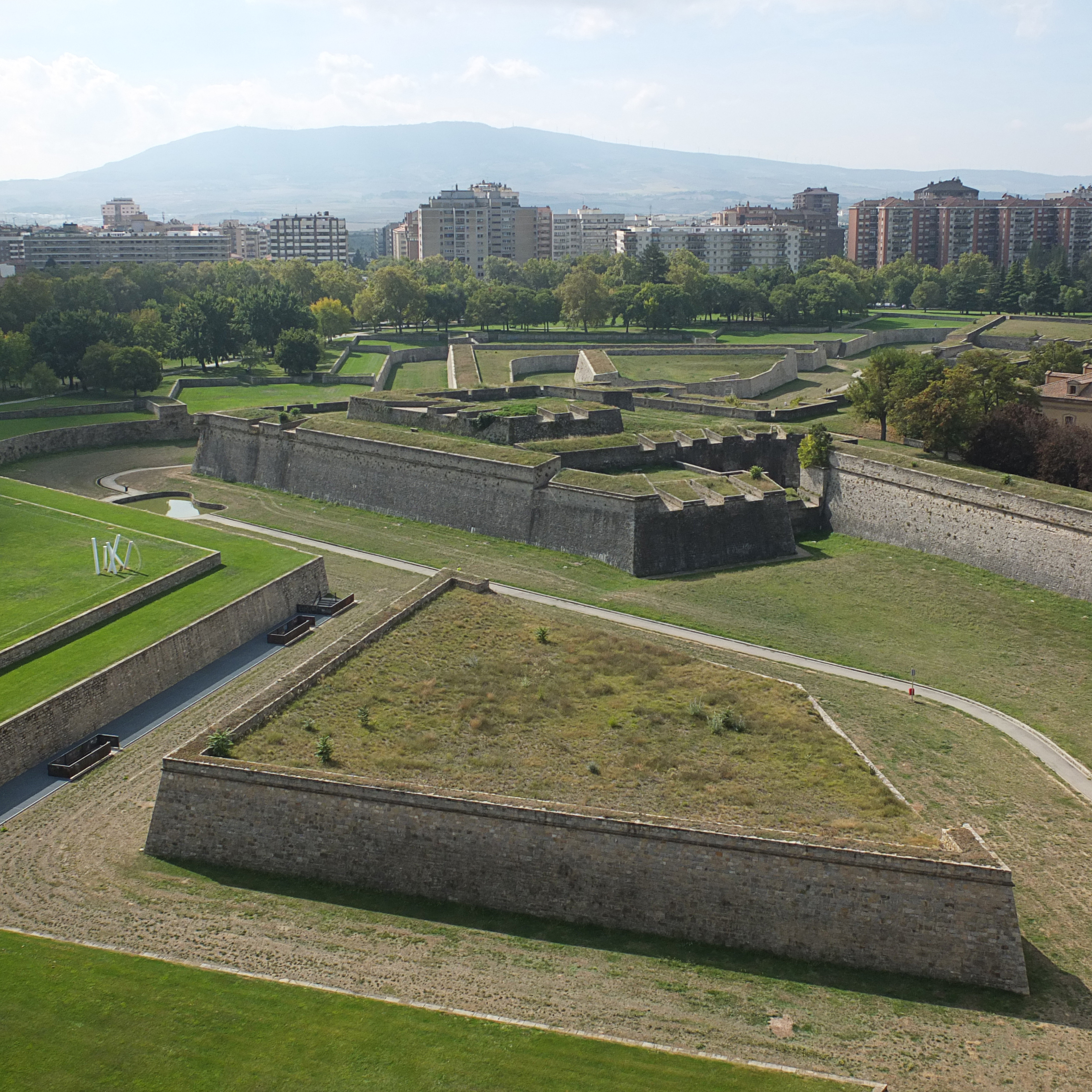 murallas